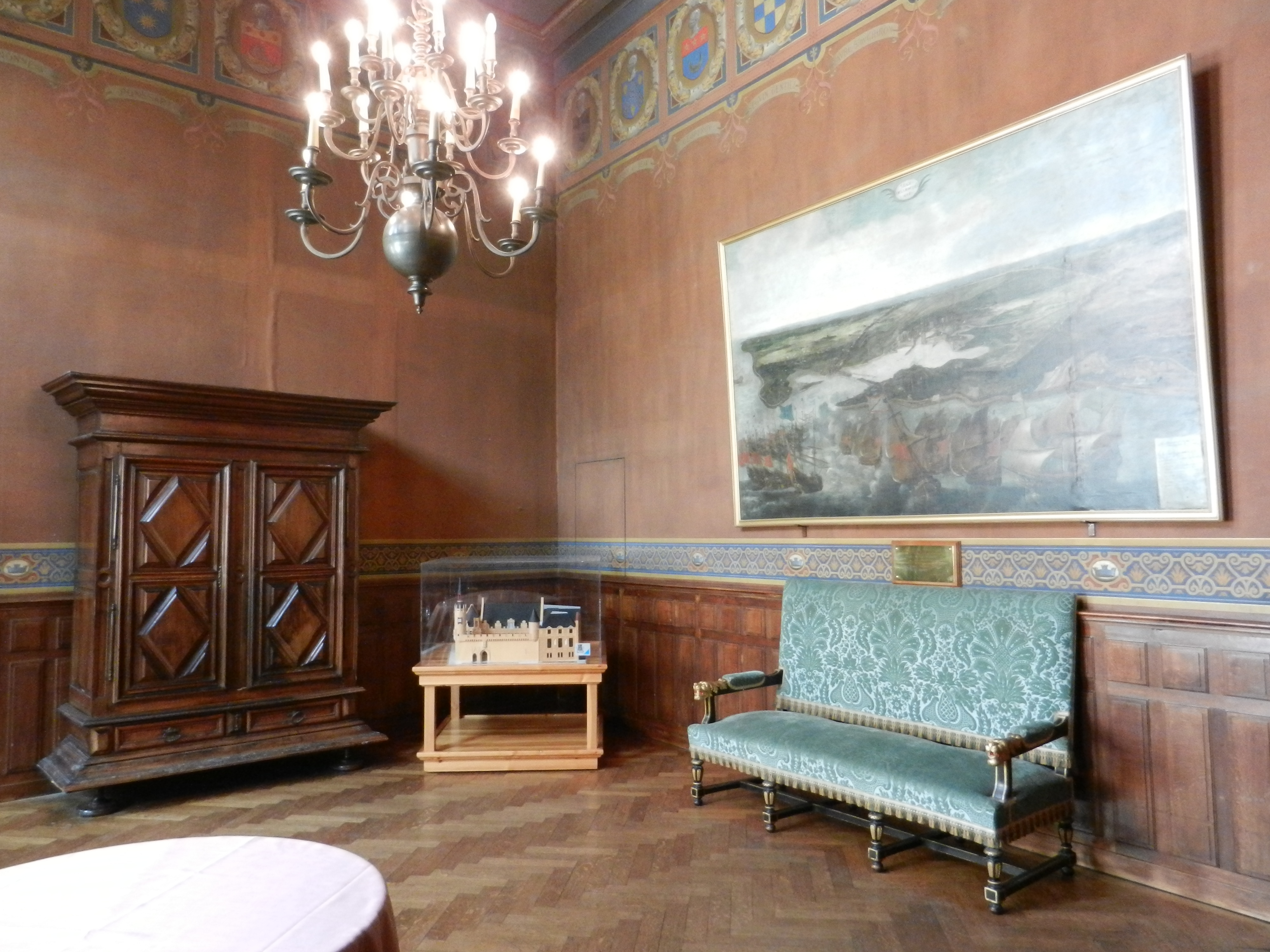 La salle des Échevins .